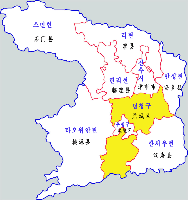 후난 창더시 현급구역도